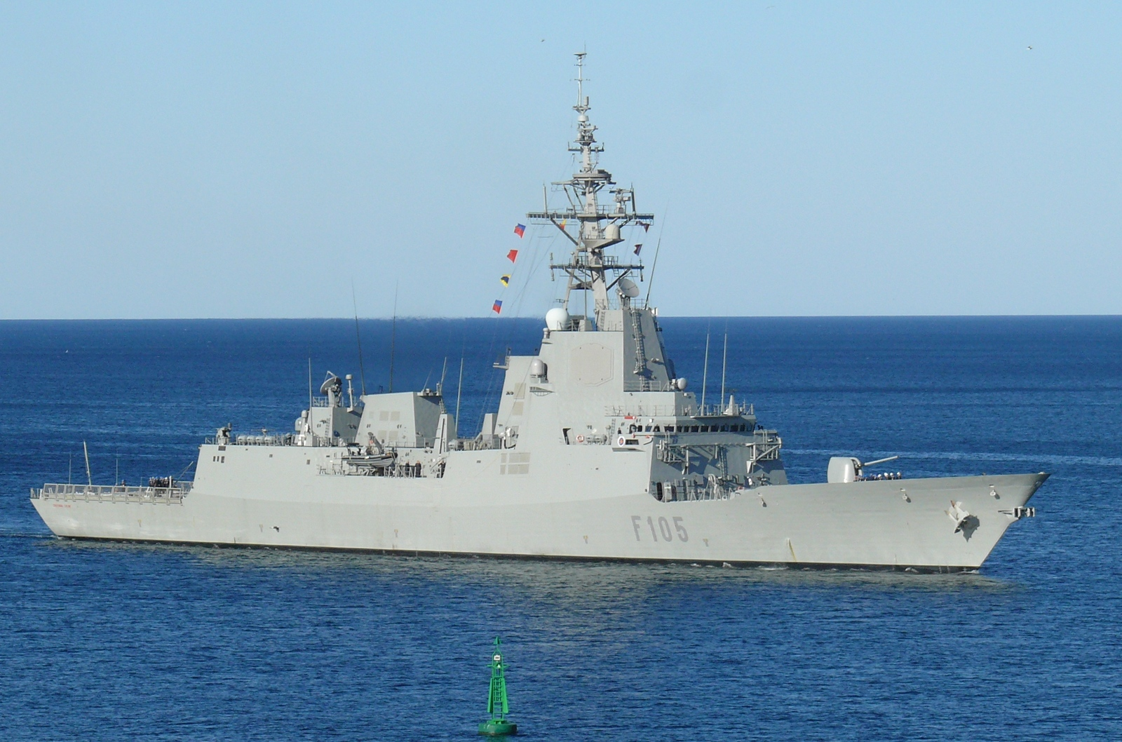 País: España España Clase, [Tipo]: A. de Bazán, [FFG]. Constructor: Navantia, Ferrol, España. Fecha botadura: 4 de noviembre de 2010. Fecha alta: 23 de octubre de 2012. Perfil Desplazamiento ( tm ): 6.041. Dimensiones ( metros ): 146,4 x 18,5 x 5 Propulsión: CODOG: 2 x turibnas de gas GE LM-2500 ( 46.648 cv ), 2 x diesel Navantia/Caterpillar Bravo 16V ( 12.000 cv ). Velocidad ( nudos ): 29. Autonomía ( millas ): 4.500 a 18 nudos. Dotación: 240 ( 35 oficiales ). Cañones: 1 x 127mm/54 Mk45 Mod. 2, 2 x 25mm Mk38 Mod.3, 4 x Browning QCB M2 12,7mm. Misiles: SSM: 8 x McDonnell Douglas Harpoon. SAM: 32 x Standard SM-2 Block IV y 64 x RIM-7PTC Evolved Sea Sparrow, desde 48 lanzadores verticales Mk 41. Torpedos: 4 x tubos de 324mm. Mk32 Mod 9. Honeywell Mk 46 mod 5. Rádar: Búsqueda aérea: Lockheed Martin SPY-1D(V) 3-D de control de armamento y asignación de objetivos; Búsqueda superficie: Raytheon SPS-67(V)4; Control de Tiro: Sistema AEGIS, 2 x iluminadores para blancos Raytheon SPG-62 (Mk99); 1 x FABA DORNA ( radar RTN-30, cañón ) ; Navegación/Superficie: Indra Aries-NAS, Indra Aries-SAAS; 3 x FLIR. Sónar: ENOSA-Raytheon DE 1160LF (I) montado en el casco. Contramedidas: Señuelos: 4 x lanzadores de señuelos FMC SRBOC Mk 36; Señuelo remolcado para torpedos SLQ-25A Enhanced Nixie; ECM/ESM: Indra SLQ-380 Aldebarán interceptador / perturbador; CESELSA Elnath Mk 9000 comms intercept. Sistema de detección laser y de contramedidas. Helicóptero: 1 x SH60B Seahawk / NH-90. Indicativo: EBDE ( Echo Bravo Delta Echo ) Comentario: Incorpora numerosas mejoras sobre el resto de unidades de la clase, propulsión, mejores sensores, armas, y equipos de comunicaciones. El hangar esta diseñado para poder operar un helicóptero NH-90. Base: Ferrol.